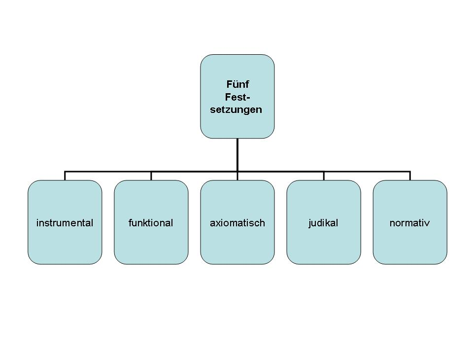 Die fünf Festsetzungen wissenschaftlicher Arbeit nach Kurt Hübner.